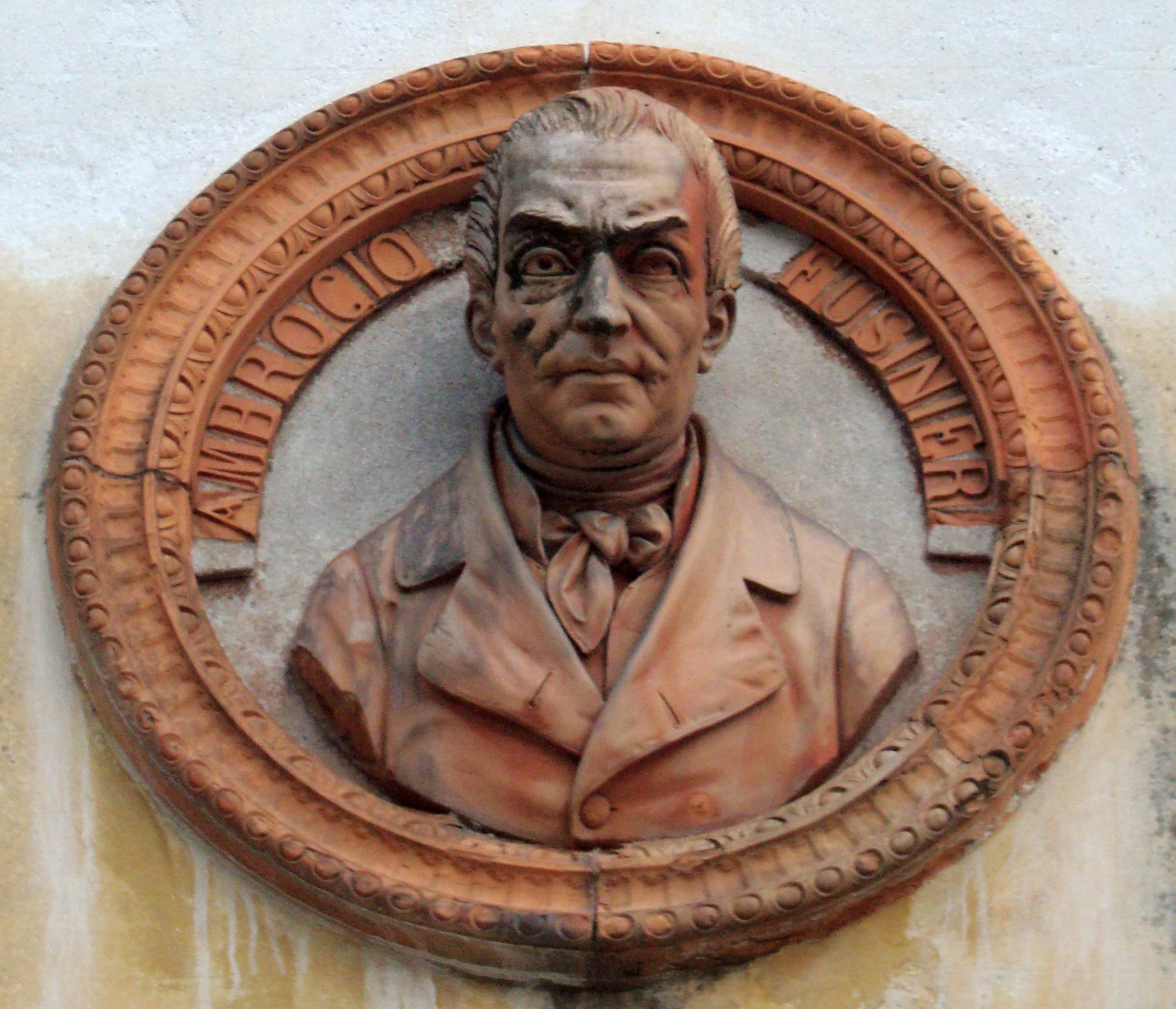 Schio, particolare della facciata del Teatro Jacquard This is a photo of a monument which is part of cultural heritage of Italy.